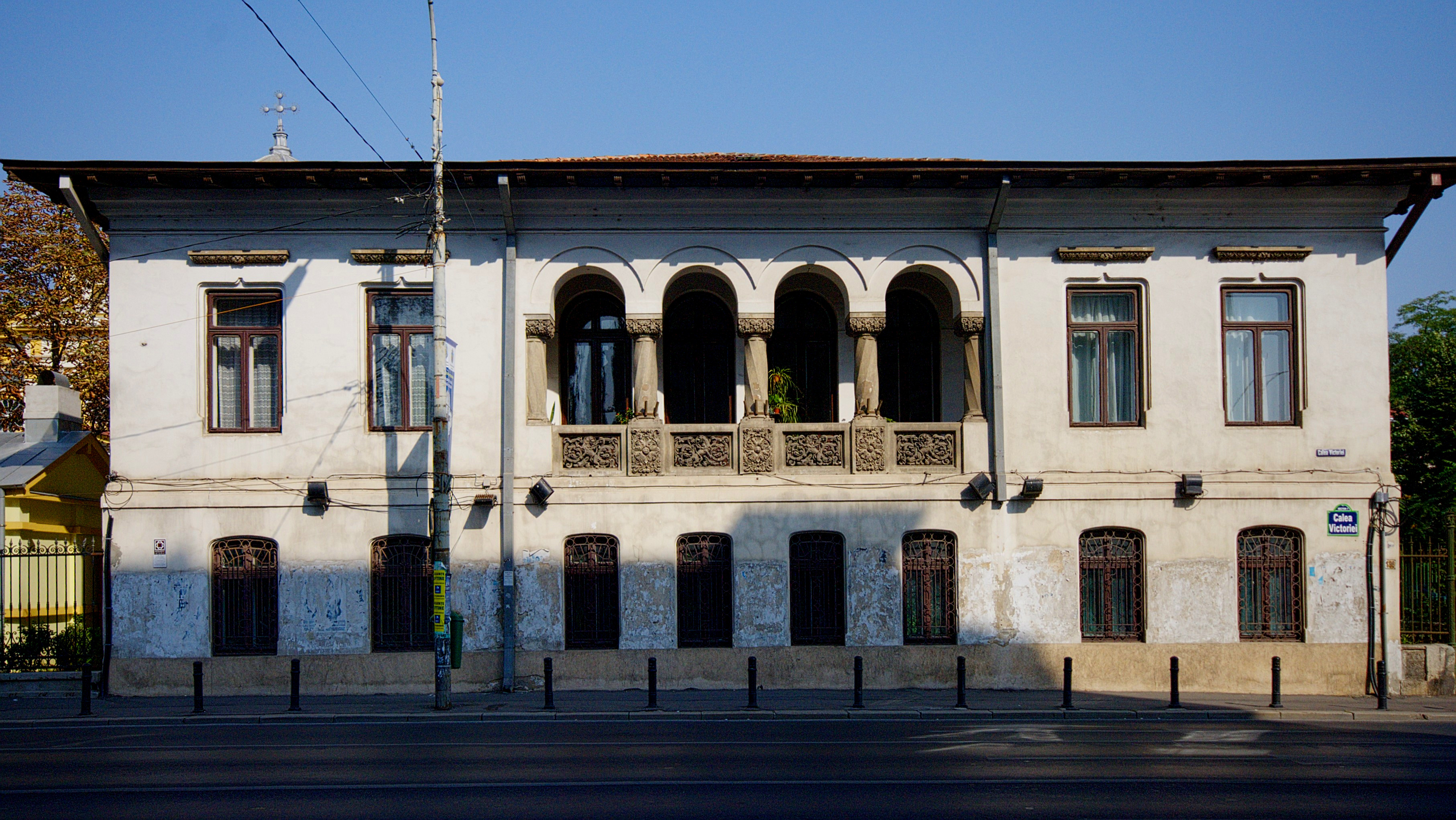 Casa Dissescu, azi Institutul de Istoria Artei "George Oprescu", Calea Victoriei 196